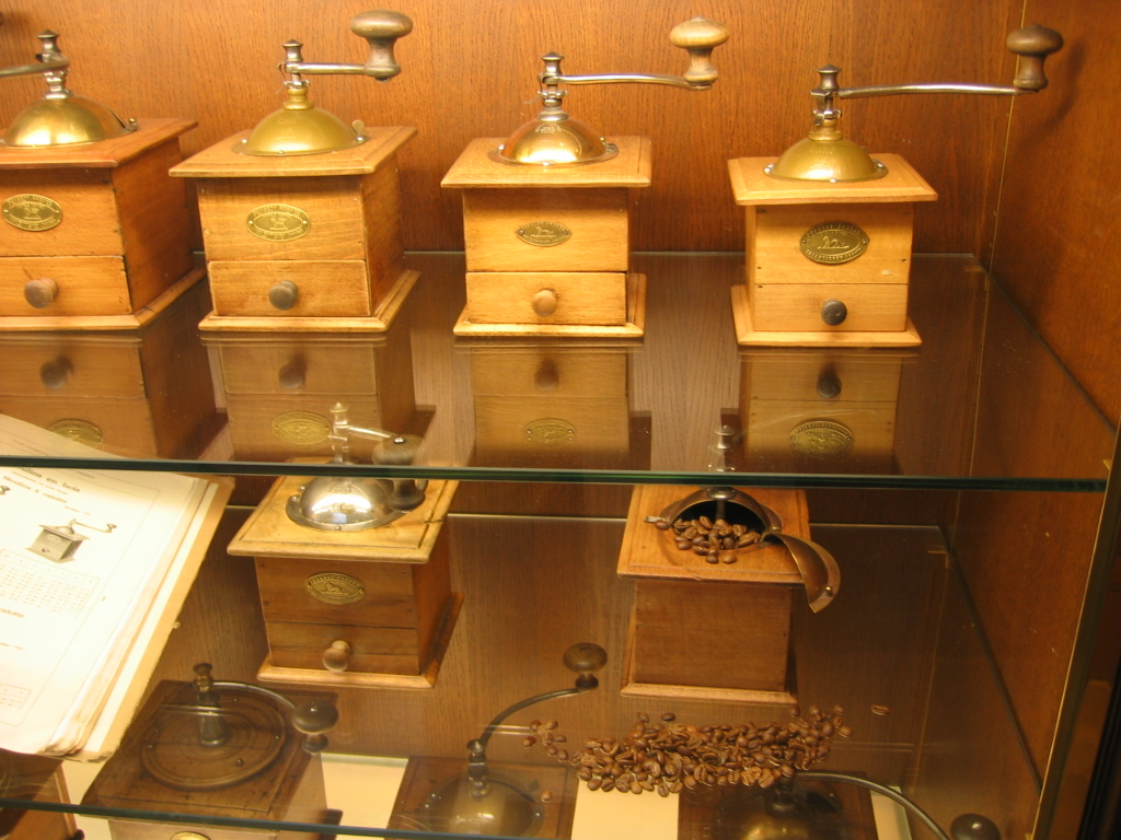 Moulin à Café Peugeot - Musée Peugeot Sochaux